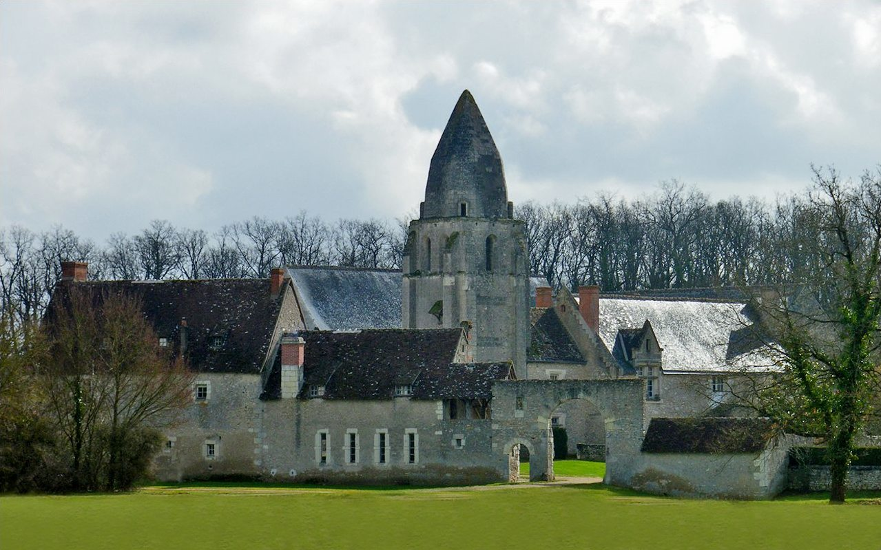 XIIe siècle Le prieuré Saint jean du Grais, à mi-chemin entre Azay sur Cher et Cormery, aurait été fondé par Foulques Nerra en 1017, mais la grande Chronique de Touraine indique que le fondateur est un certain Joscelin mort en 1146. D'abord propriété de la collégiale Saint Martin, le prieuré est ensuite donné à des ermites de la contrée. Il appartient en 1603 aux chanoines réguliers de Saint Augustin, puis au collège de Tours en 1701. L'église prieurale datant du début du XIIe siècle disparaît vers 1850 ; il n'en subsiste que le clocher, dont le beffroi est percé de deux ouvertures en plein cintre, et dont la flèche en forme de mitre rappelle le clocher de Courçay, typique de la vallée de l'Indre. Au centre du prieuré, le puits couvert et charpenté est resté intact.